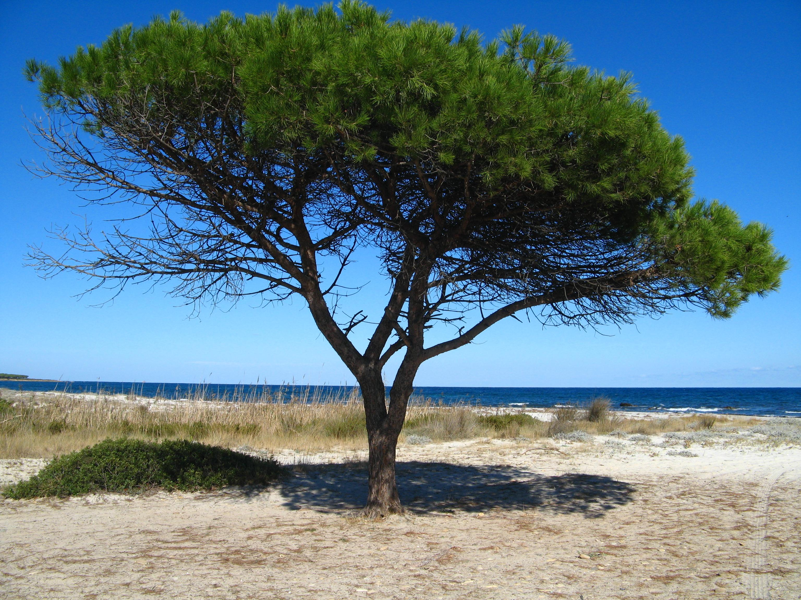 Fotographie einer Pinie